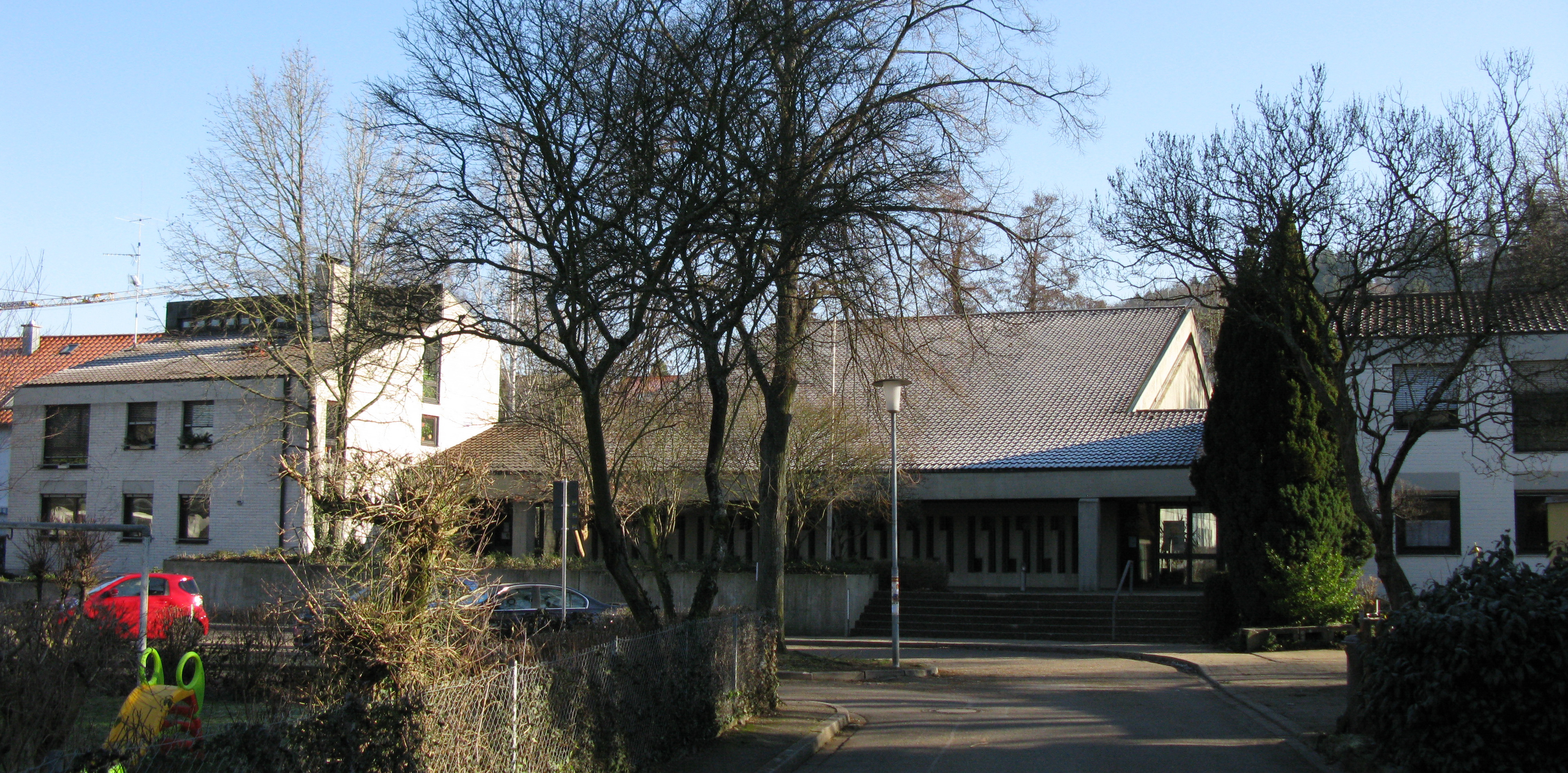 Evangelische Johanneskirche in Merzhausen, Sicht von Westen